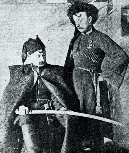 Старшини 3-го Гайдамацького полку, 1919 р.